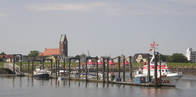 Bilder aus Cuxhaven